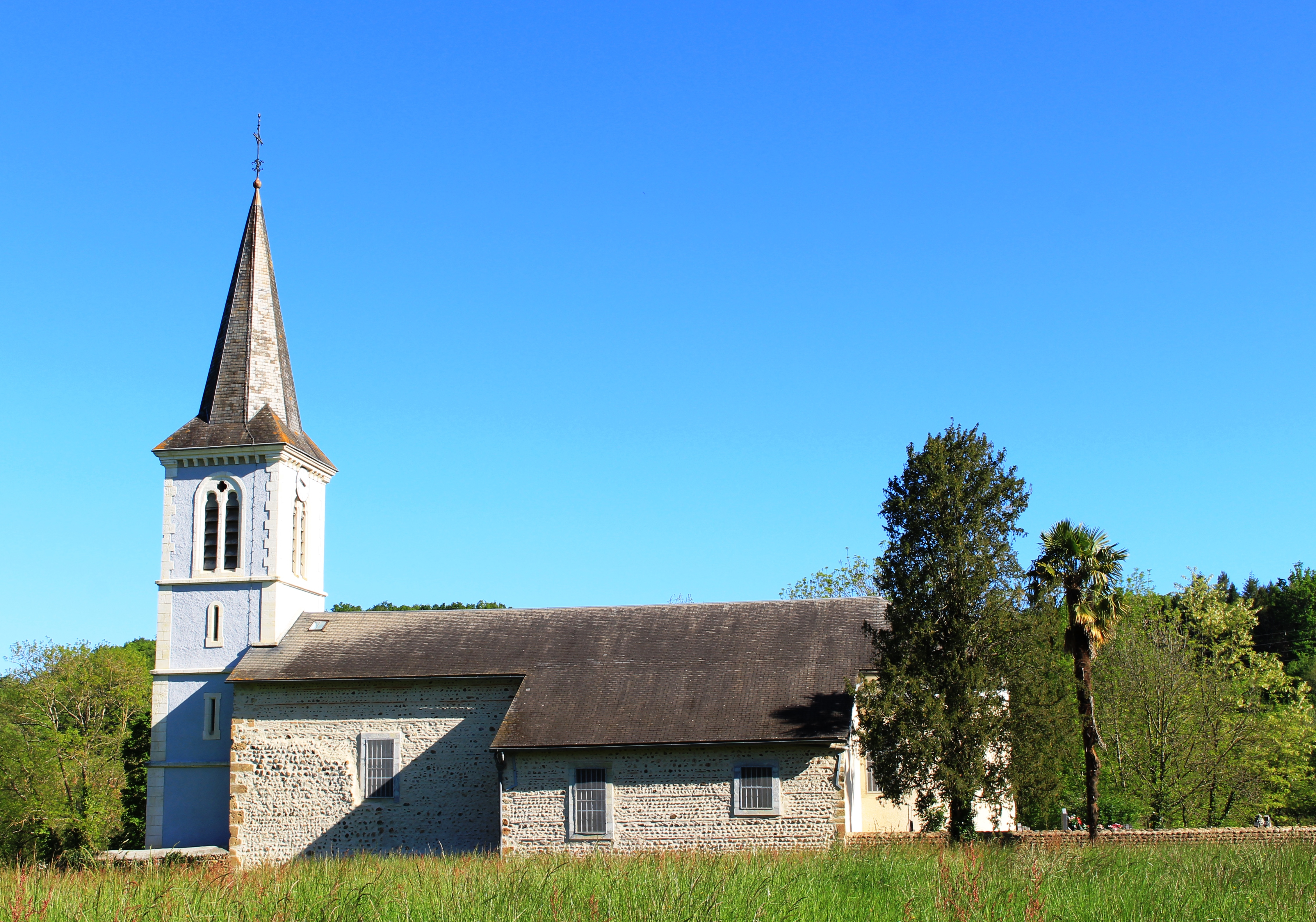 Église de l'Assomption d'Osmets (Hautes-Pyrénées)